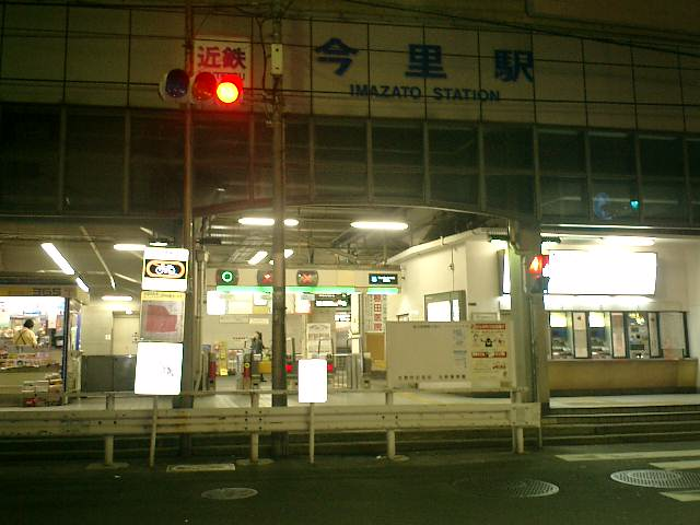 近鉄今里駅(2004年11月 MASA撮影)